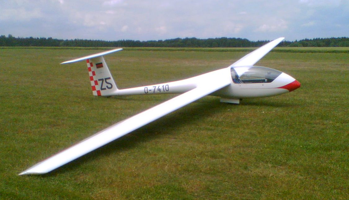 Astir CS auf dem Segelfluggelände Mönchsheide * Freigabe: OTRS Ticket#: 2006070310002067